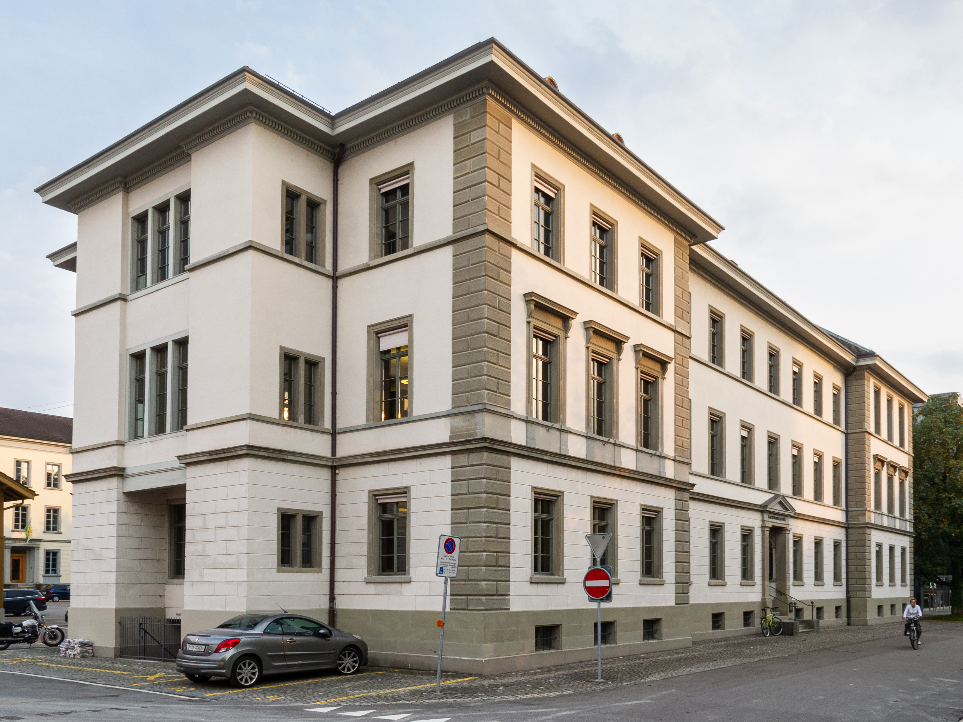 Kantonsbibliothek Thurgau (Gebäude)